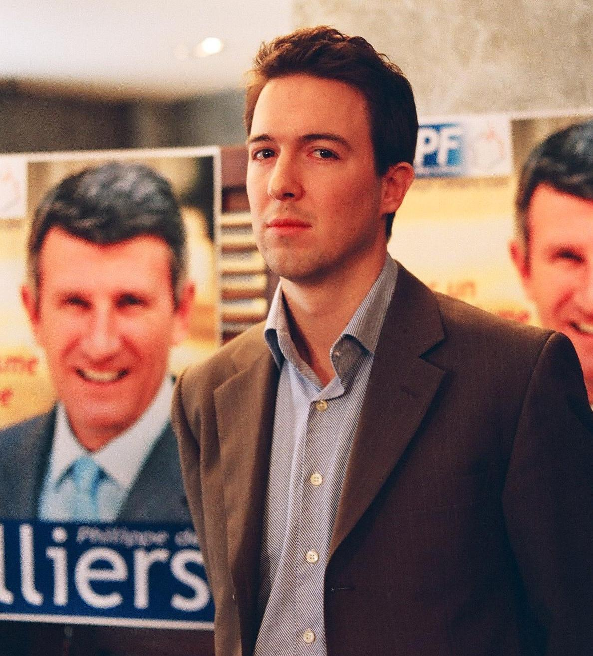 Guillaume Peltier à Paris